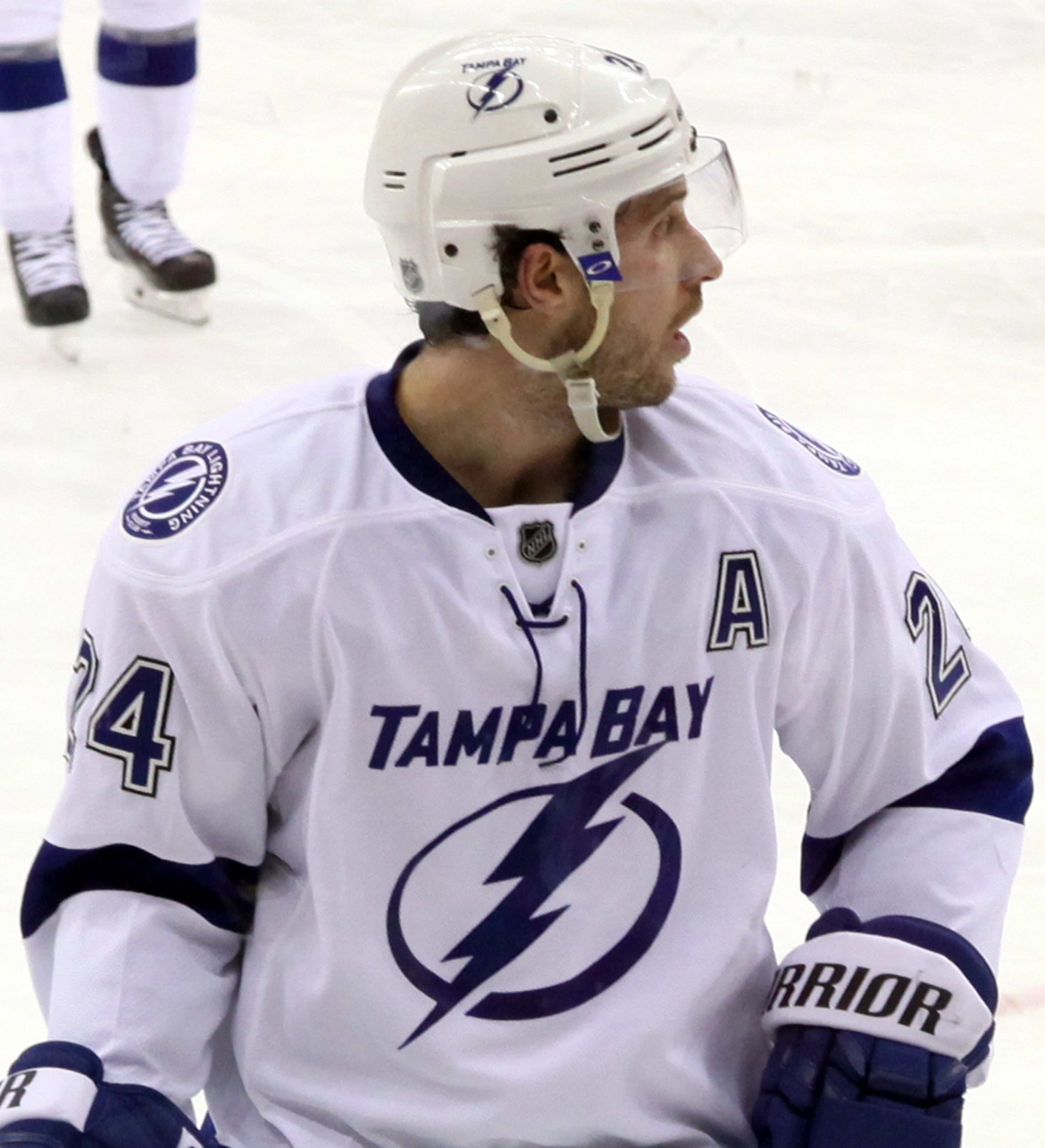 Ryan Callahan in December 2014.